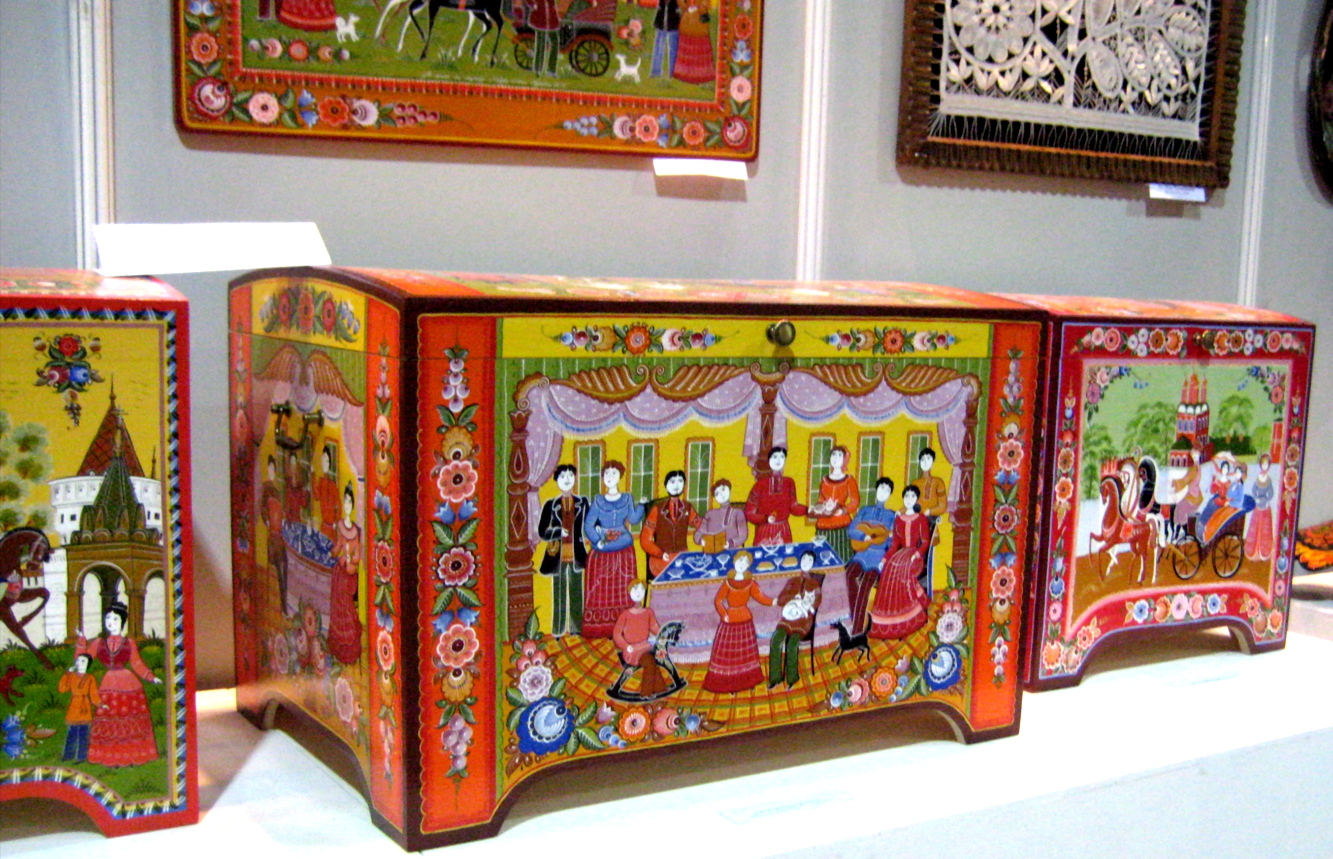 ЗАО "Городецкая роспись", выставка "Ладья-2010"